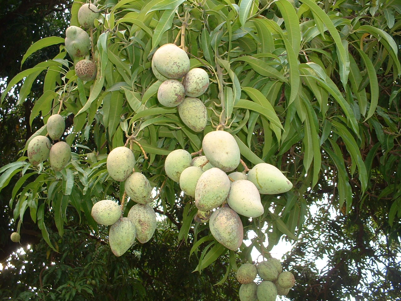 Photo de mangues pris en octobre 2004 dans la cité El Faroko (banlieu de Bamako)